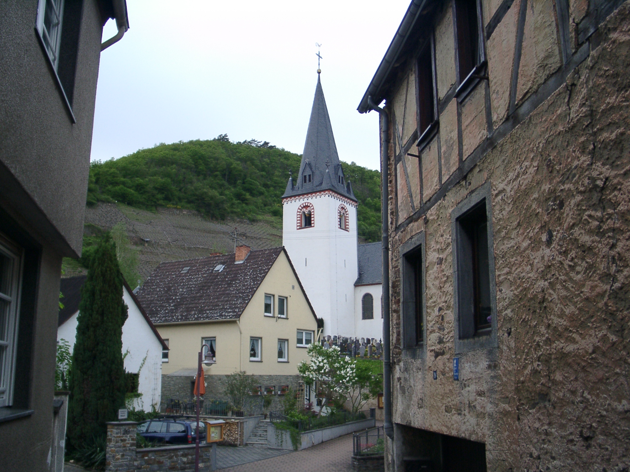 Kirche von Löf - selbst fotografiert (Klaus Graf) 5.5.2005